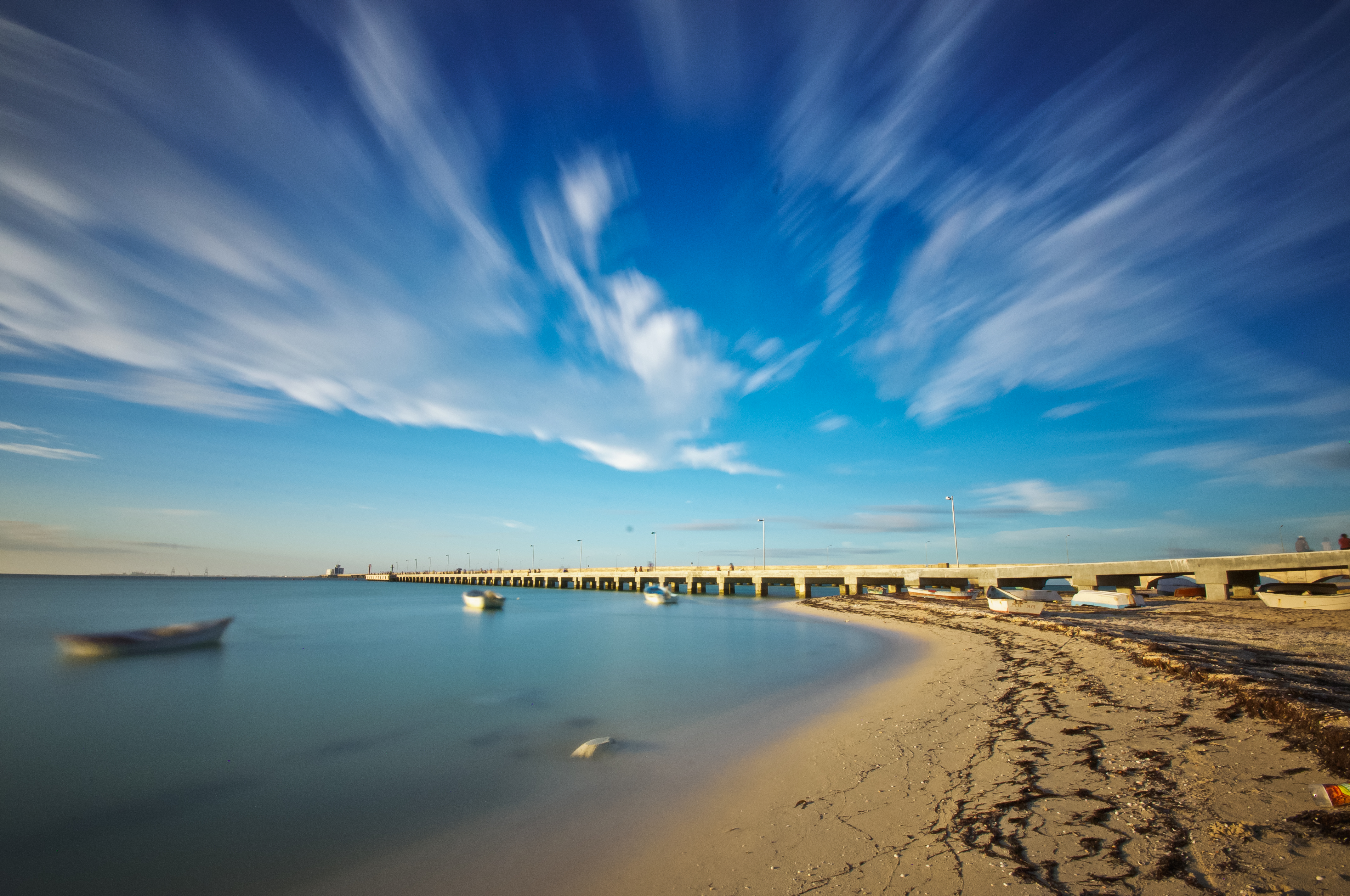 Pose longue sur la plage (ND 110), Progreso, Yucatan, Mexique.